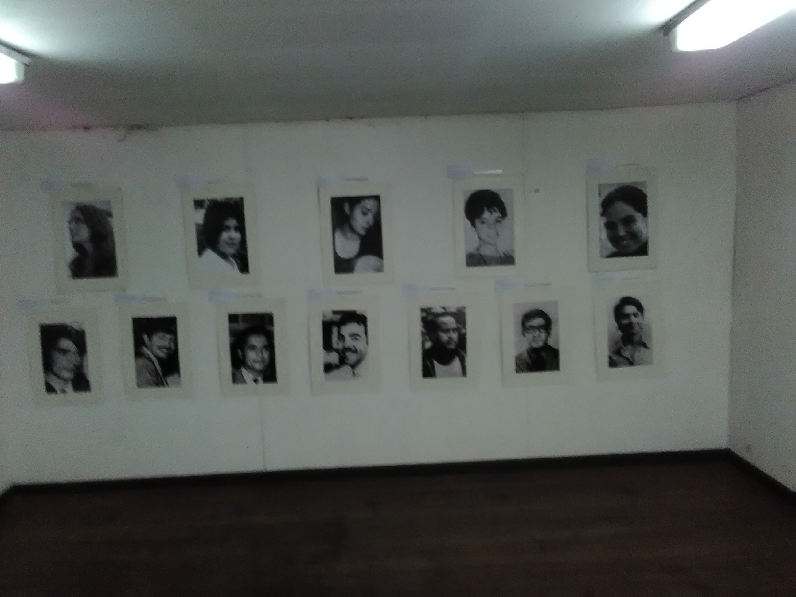 Ubicado en Santiago de Chile, frente al cerro del mismo nombre, fue usado como lugar de torturas y de desaparición de personas durante los primeros años del Régimen Militar.